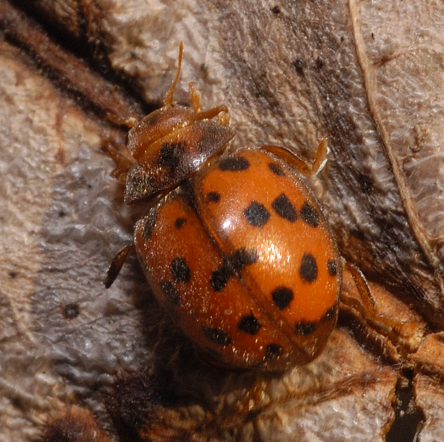 Subcoccinella vigintiquatuorpunctata (Linnaeus, 1758)